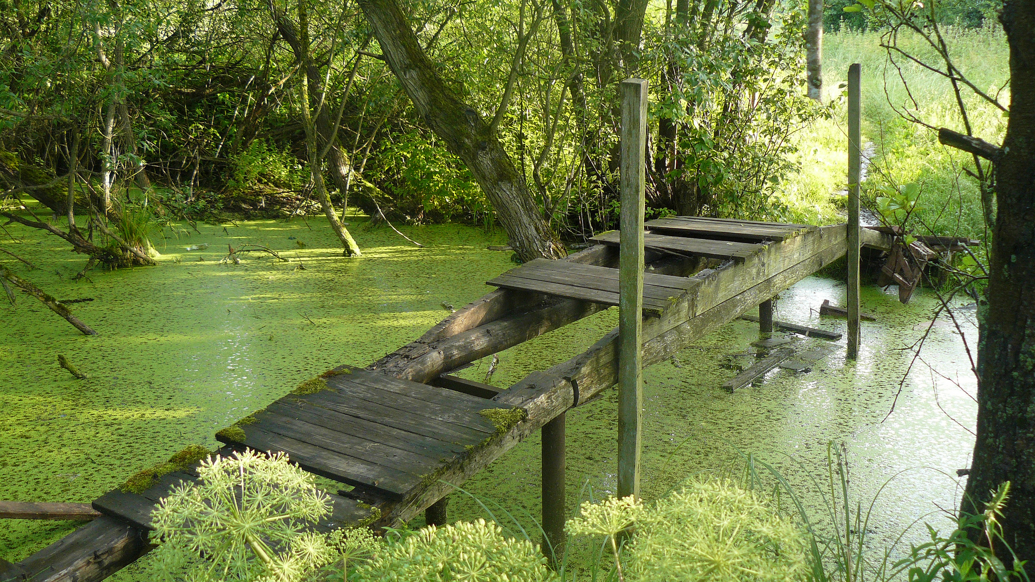 Стары мост. Заслаўе